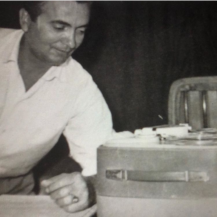 Kompozitori Abdulla Grimci gjatë punës së tij.